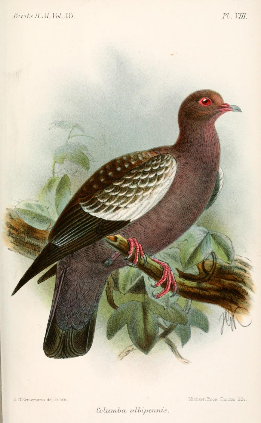 Columba albipennis = Patagioenas maculosa albipennis, Spot-winged Pigeon